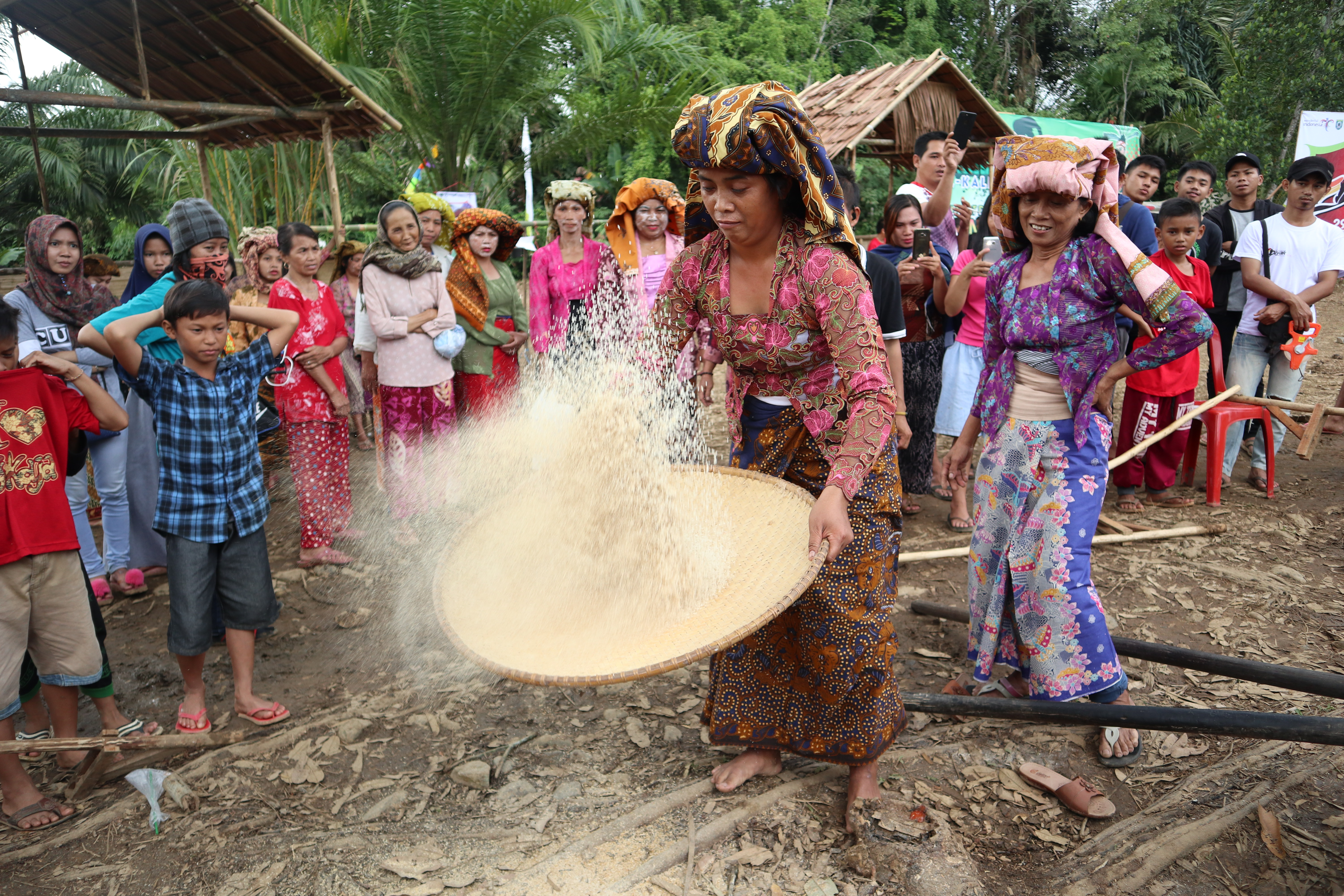 Proses menampi beras yang diperagakan oleh wanita suku Dayak Halong dalam Festival Pesona Budaya Dayak Meratus IV di Kabupaten Balangan, Kalimantan Selatan pada 31 Maret 2018.